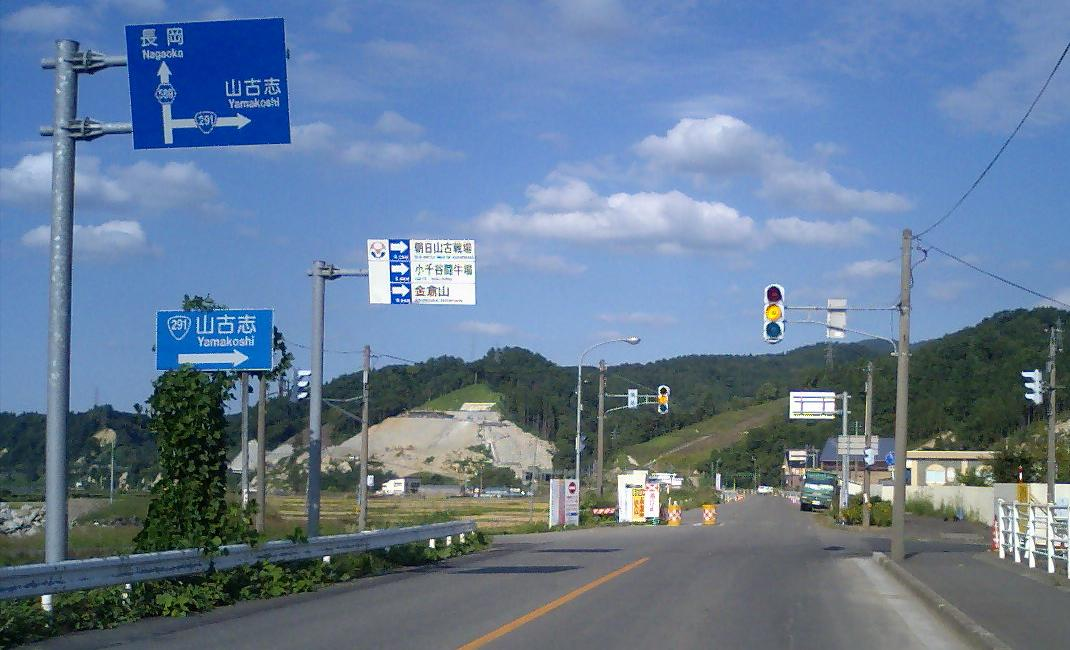 新潟県小千谷市大字横渡字砂田の横渡交差点（新潟県道589号小千谷長岡線の起点）を投稿者本人が撮影。2006年9月24日。撮影されたそのままではなく不要部は切り落としてある。新潟県中越地震被害からの復旧工事の中途の姿の崖崩れ現場を望むことが出来る。